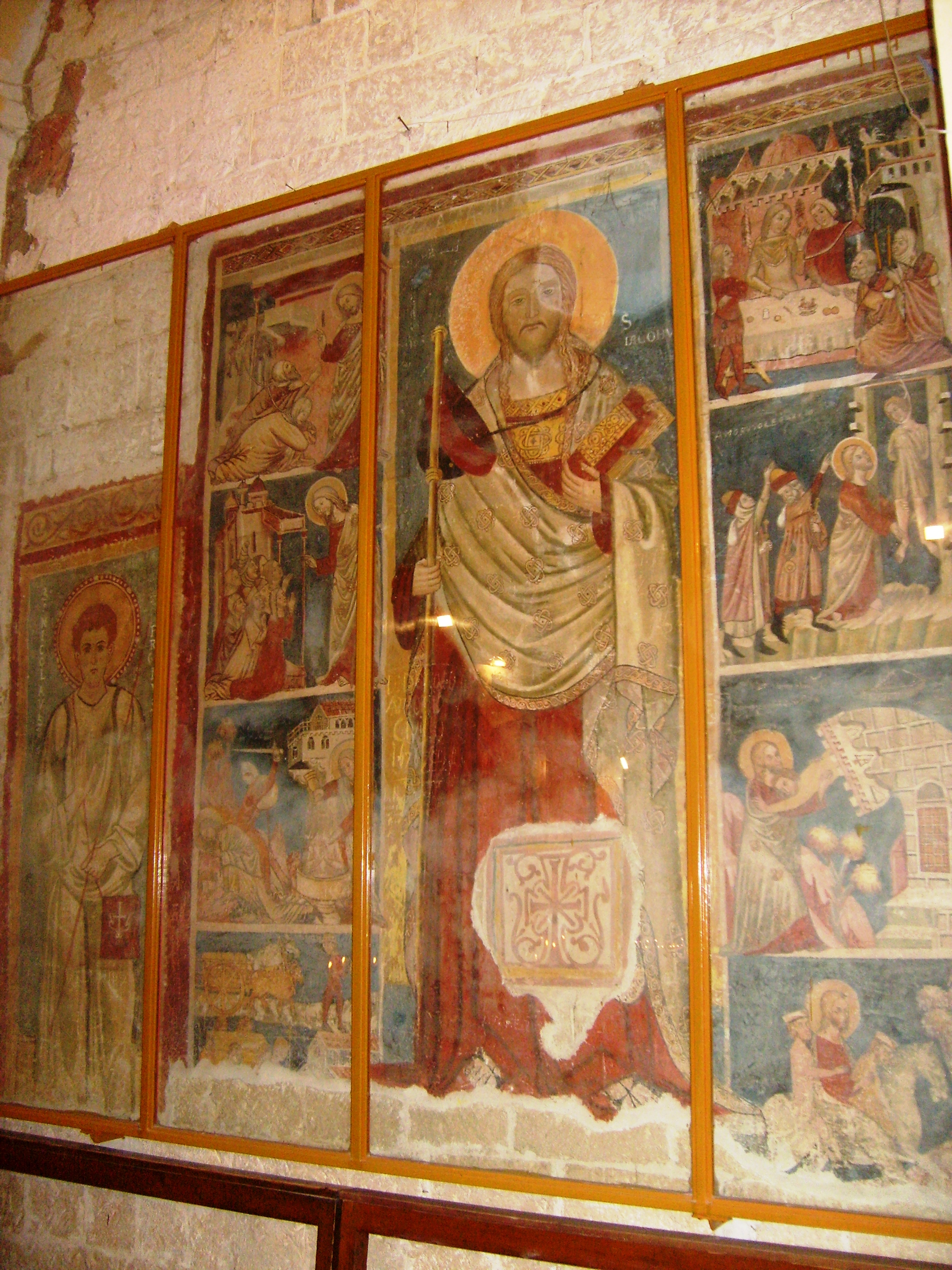 Affreschi